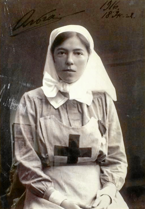 Великая княгиня Ольга Александровна — сестра милосердия